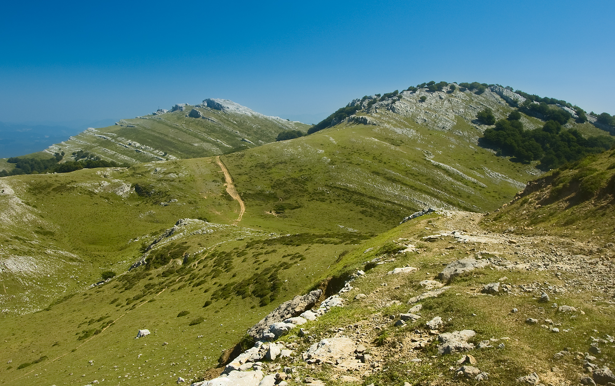 Arlutz menditik iparraldera ikuspegia. Eskuinean Aranguren mendia ikusten da, eta ezkerrean Elorretazko Haitza. Kurtzebarriko gurutzea ere ikus daiteke azken honen ondoan. You can contribute by translating this description into more languages.